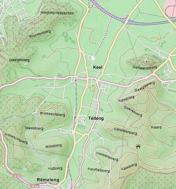 Kaart vun der Gemeng Keel mat hire Bierger. This map may be incomplete, and may contain errors. Don't rely solely on it for navigation.